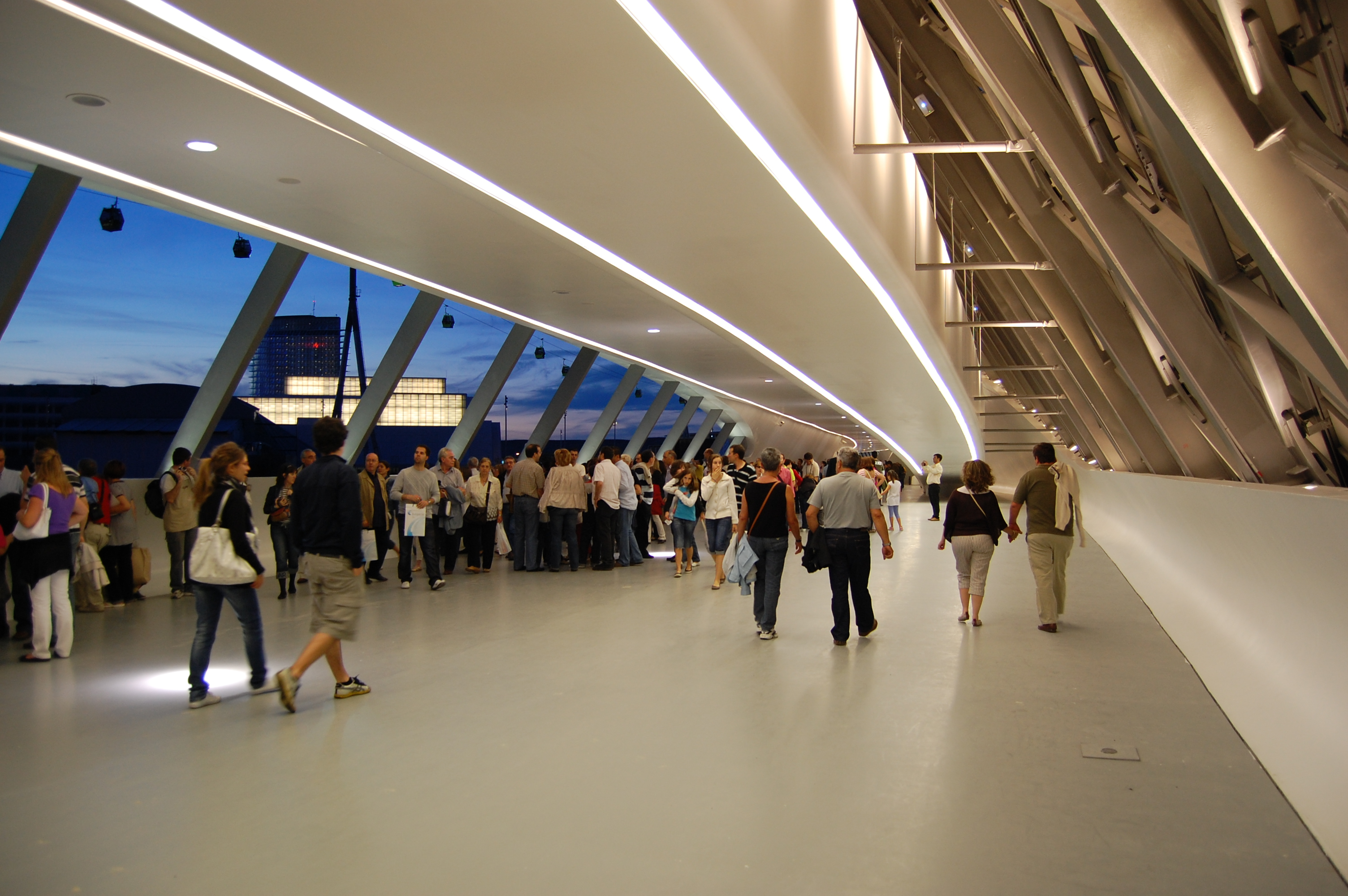 Interior del Pabellón puente en la Expo de Zaragoza 2008, España.